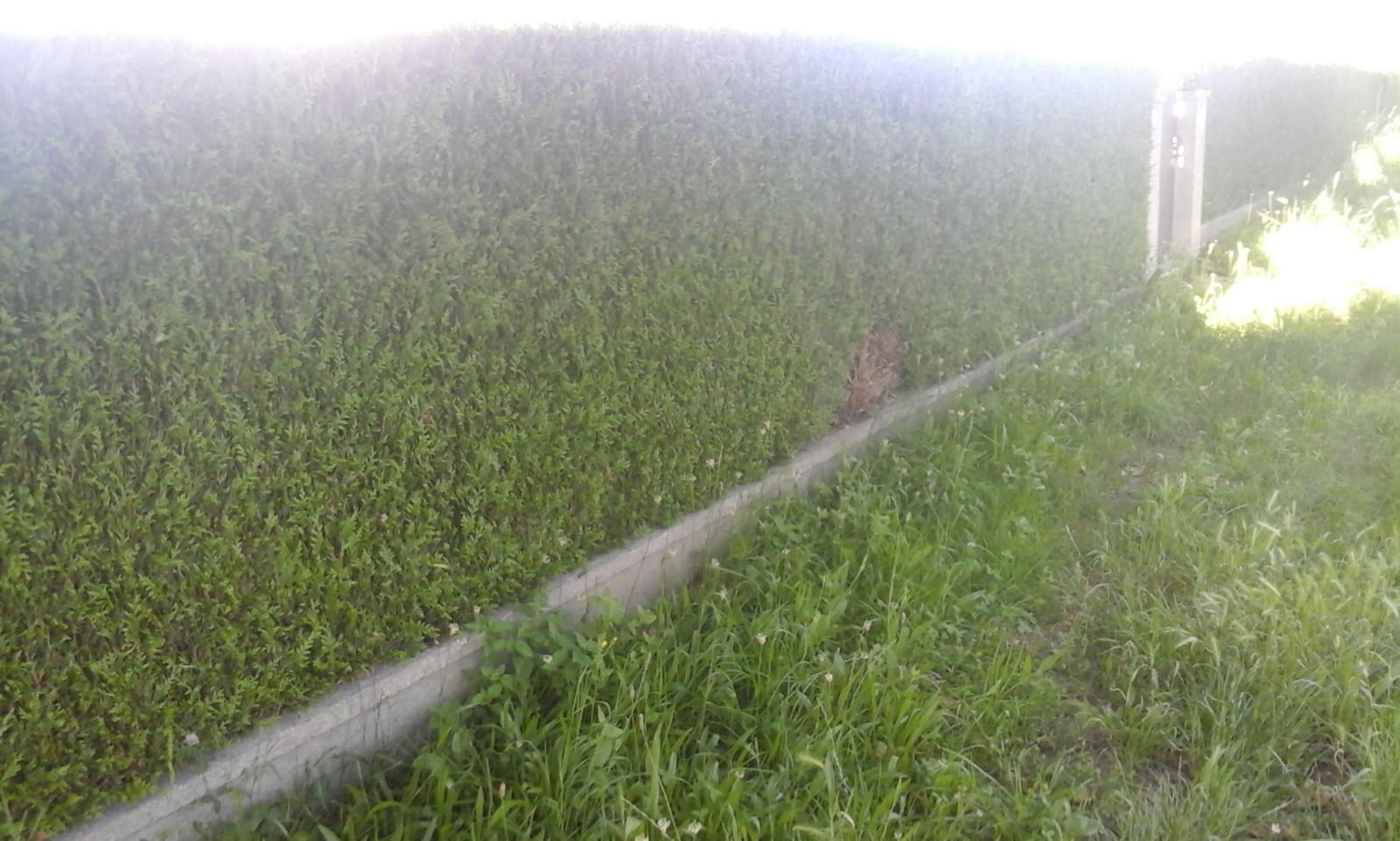 Haie taillé de thuyas (Thuja occidentalis) en France.